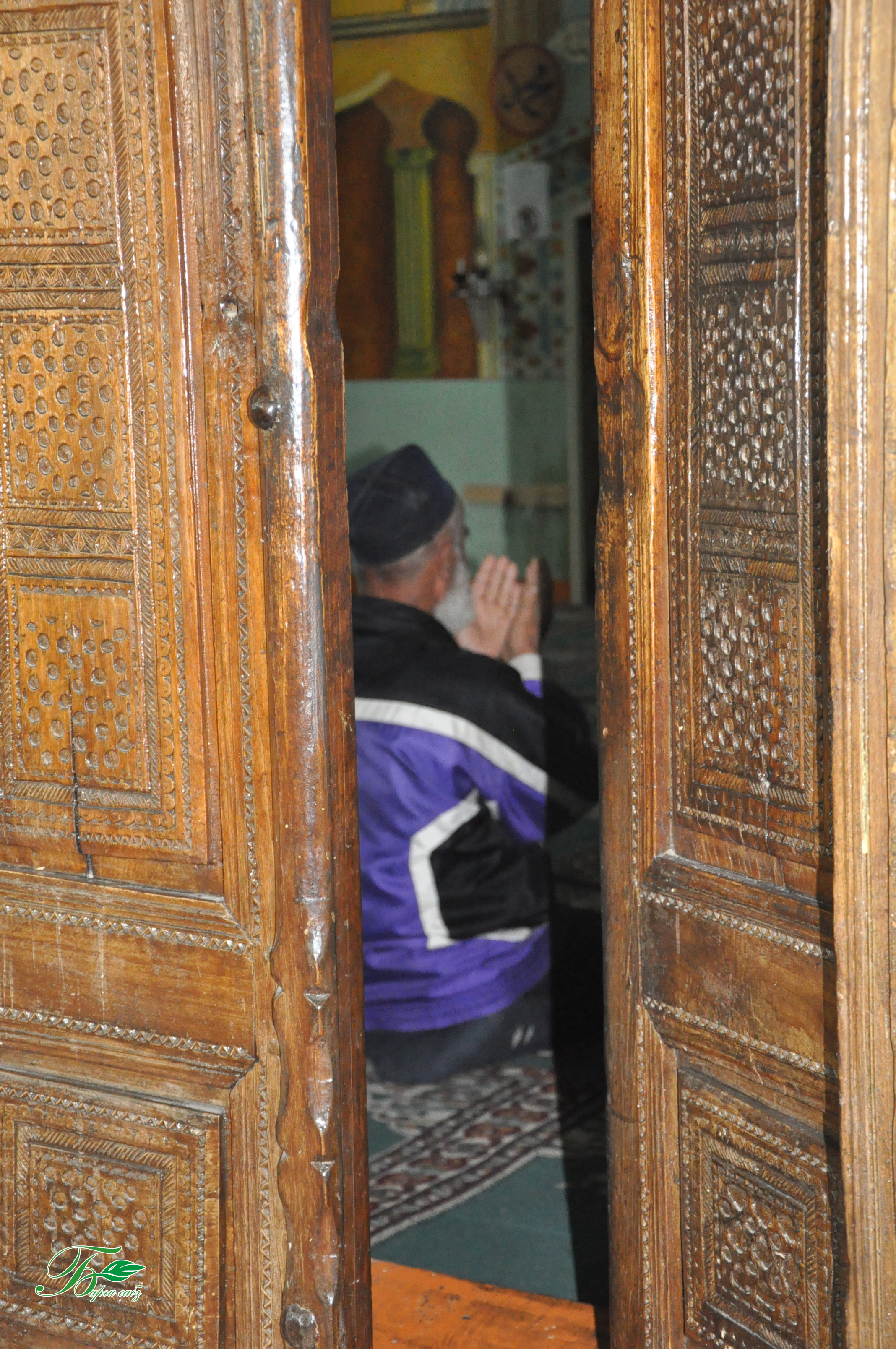 Тоҷикӣ: Марде ҳангоми намозгузорӣ